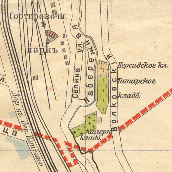 Персидское, Татарское и Холерное кладбища на плане Санкт-Петербурга, 1913 год